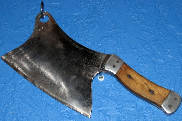 Секач. Поворской топор.